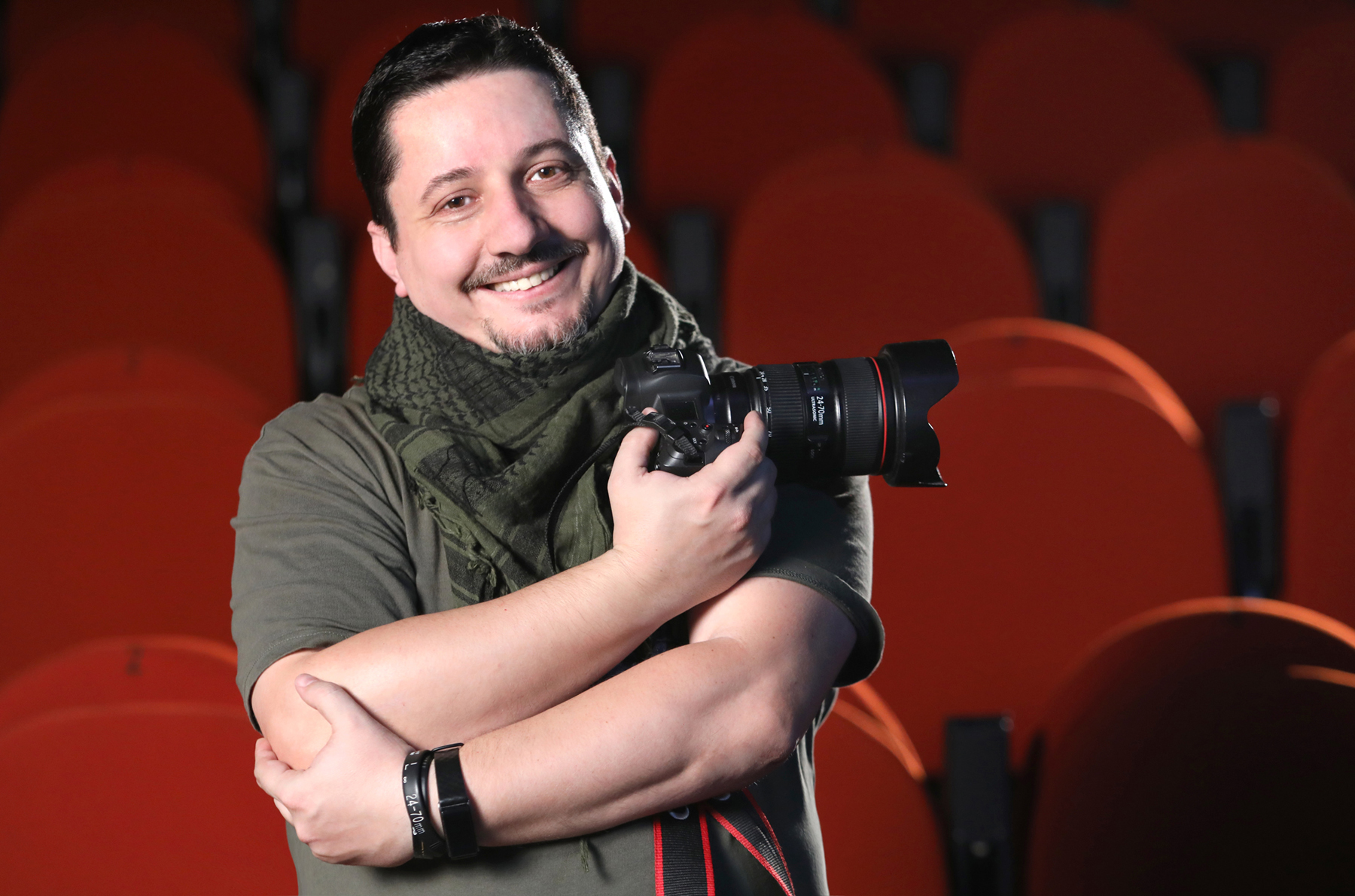 Florin Ghioca, theatre photographer